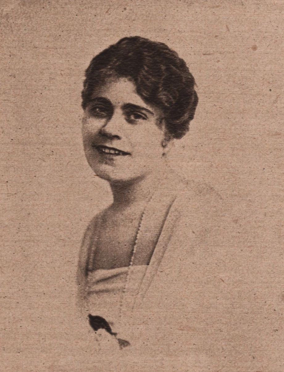 Annie Rosar (1888–1963), Austrian actress